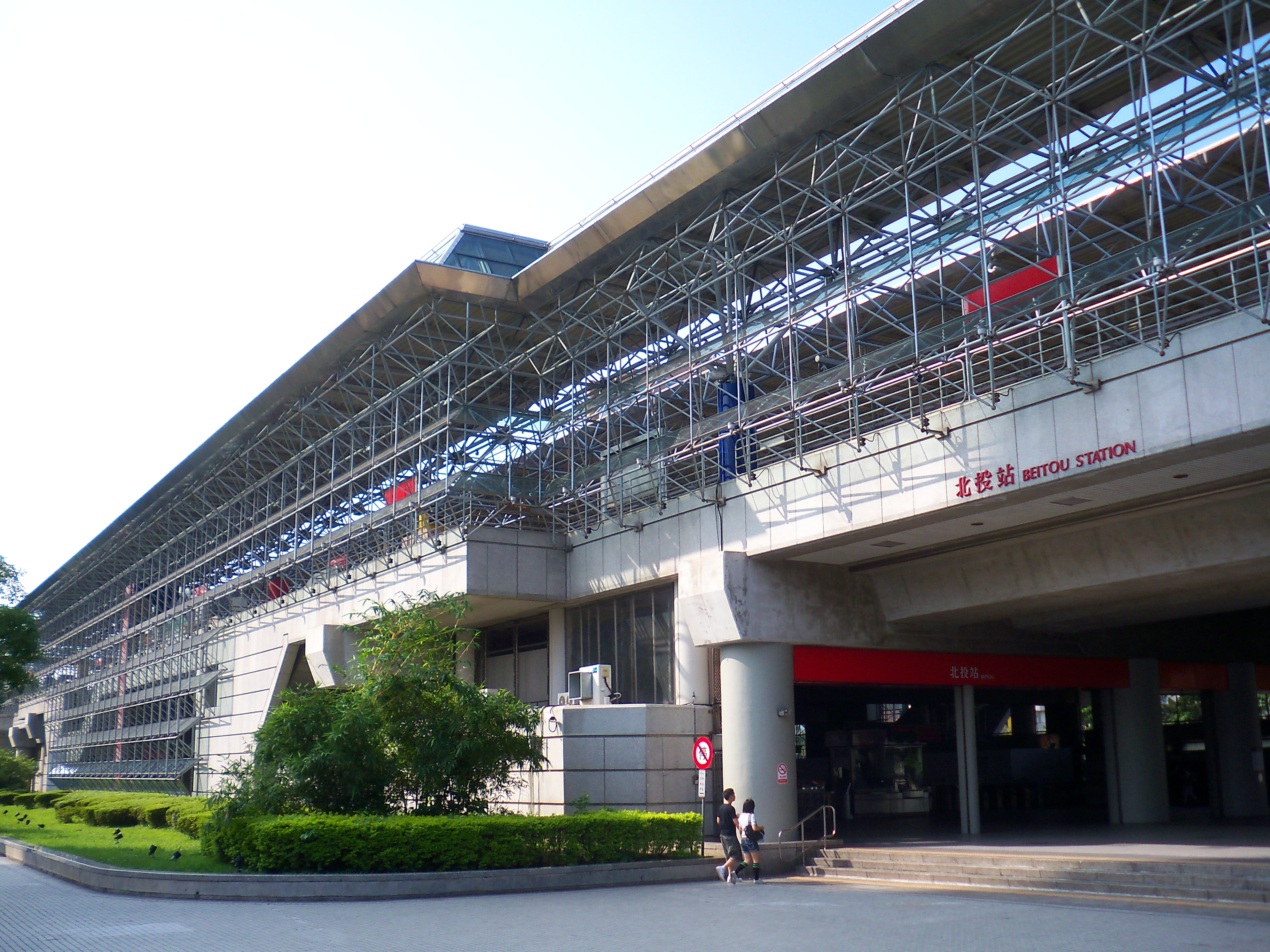 台北捷運淡水線北投駅。